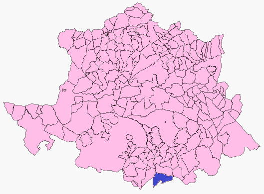 Miajadas